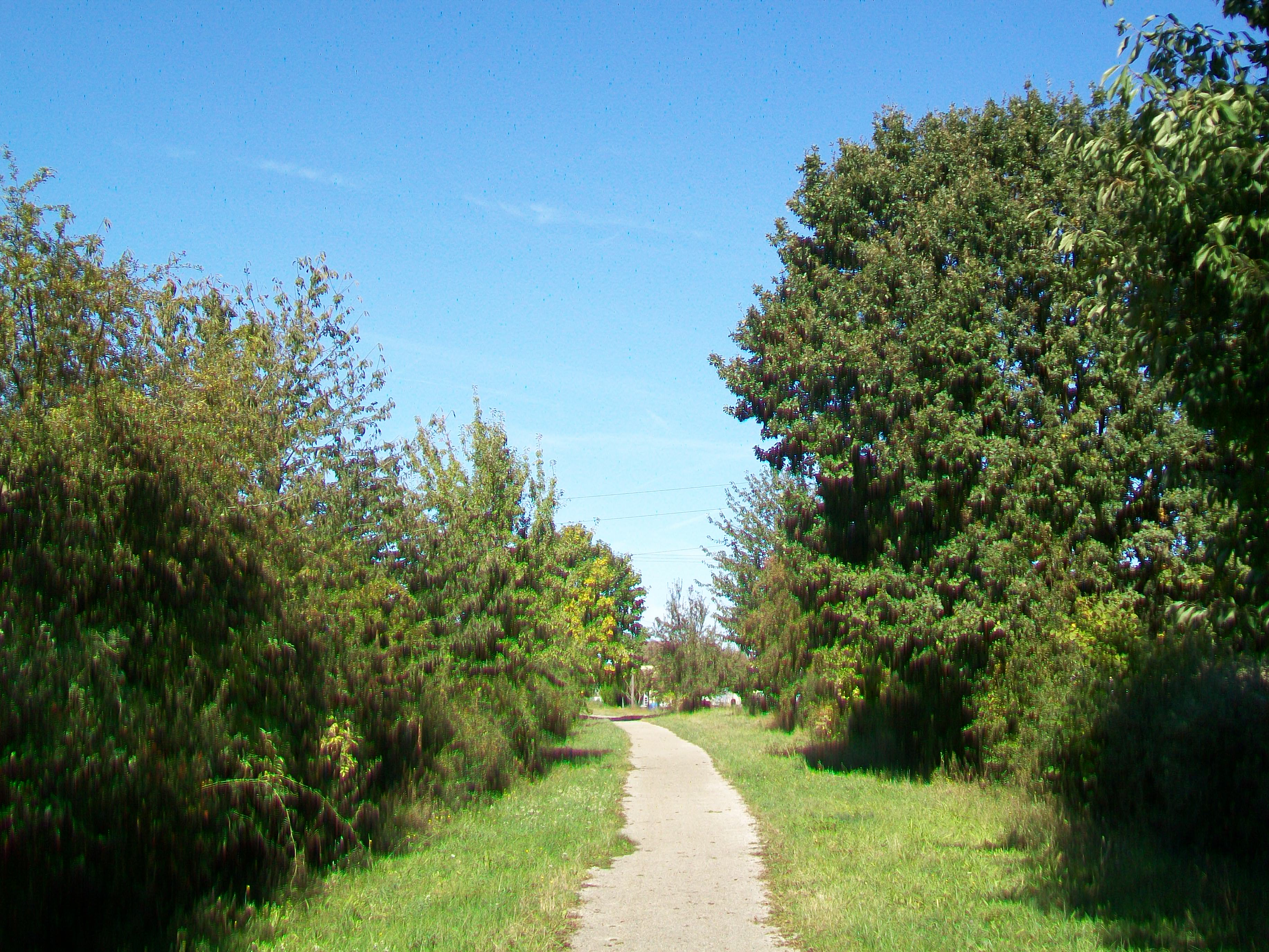 Le tracé de l'ancienne voie ferrée Verberie - Estrées près de Longueil-Sainte-Marie, entre le hameau de Rucourt et le bourg.